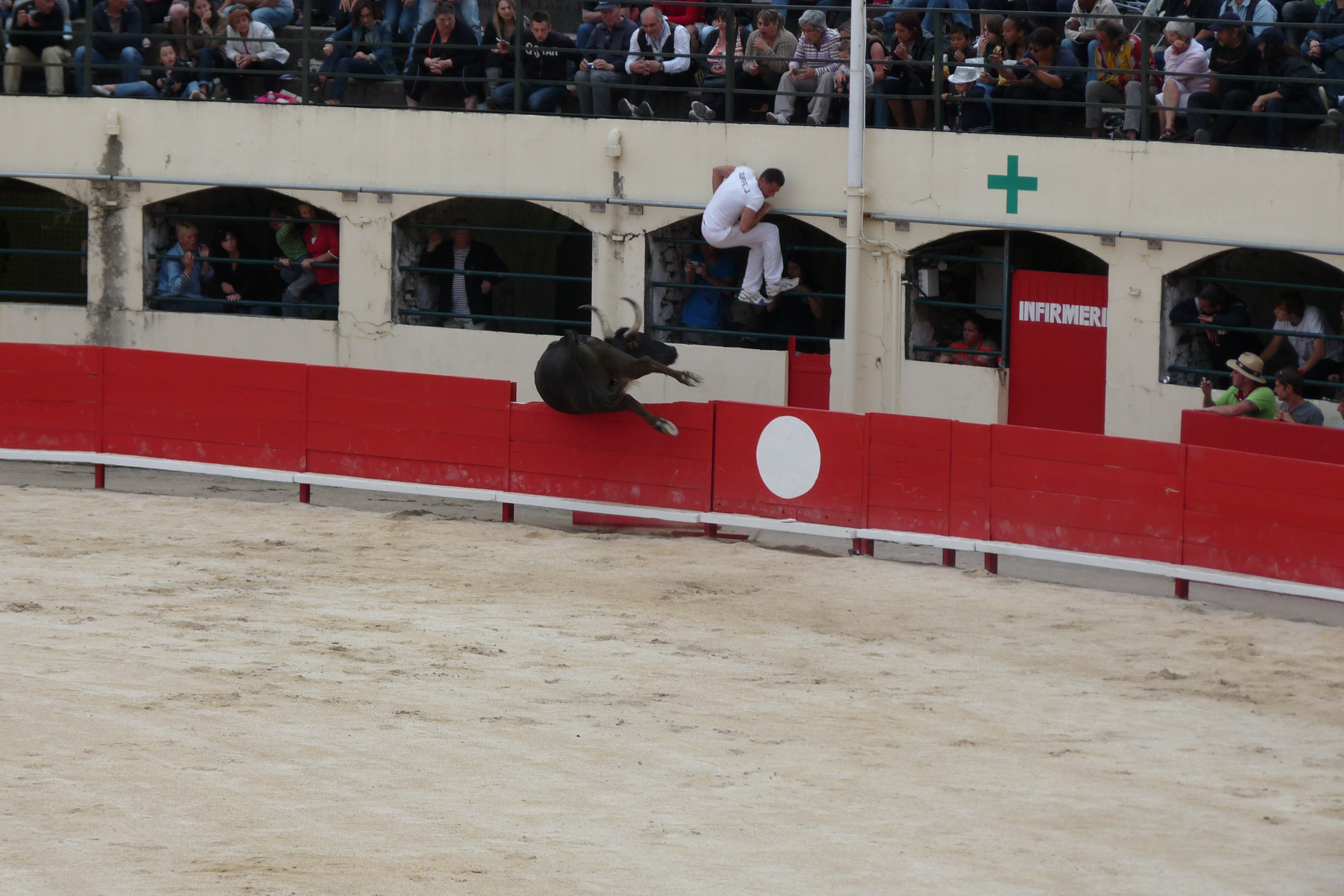 Scène d'une course camarguaise dans les arènes d'Alès.